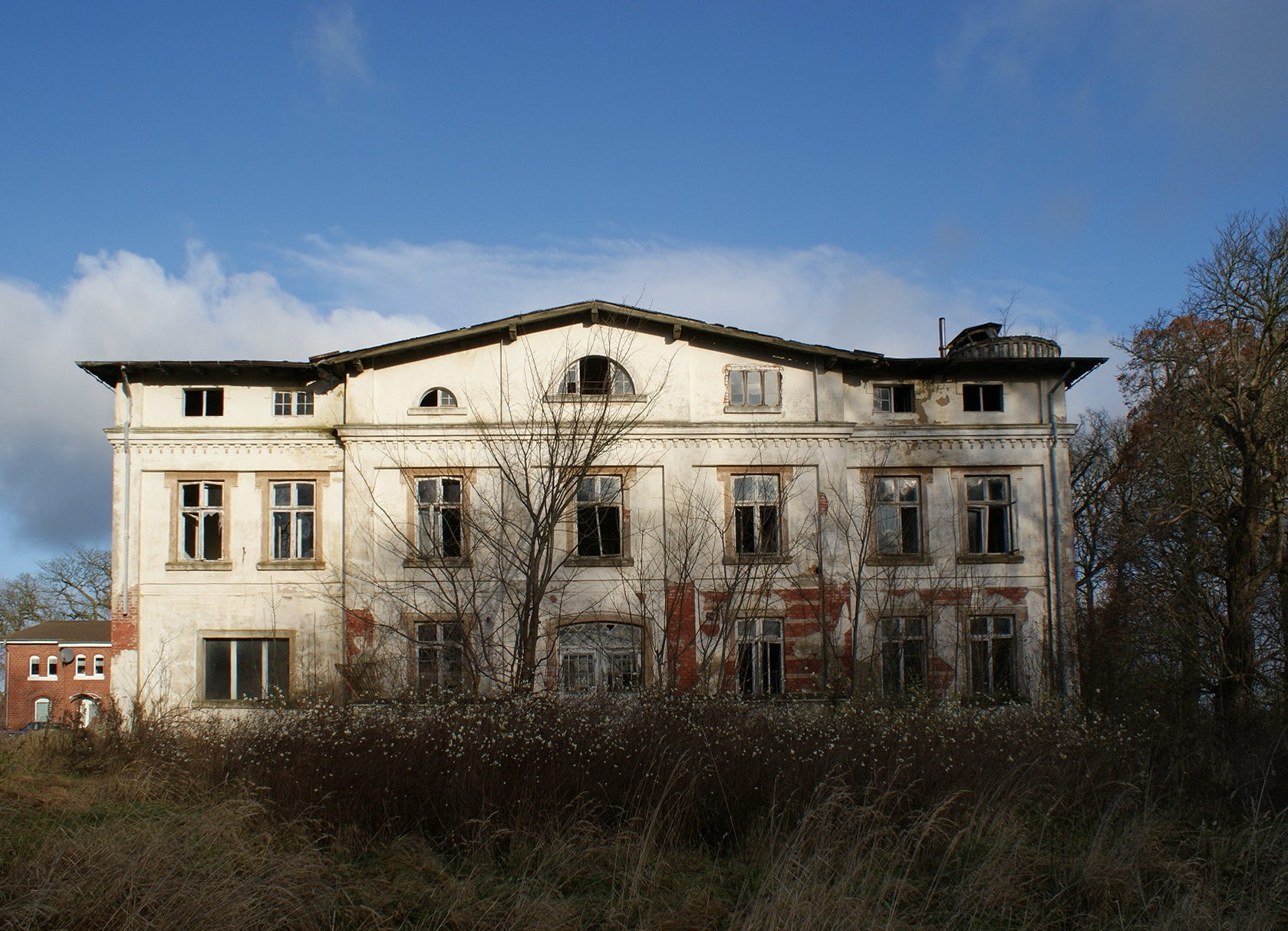 Neparmitz, Landkreis Vorpommern-Rügen. Gutshaus von Süden.